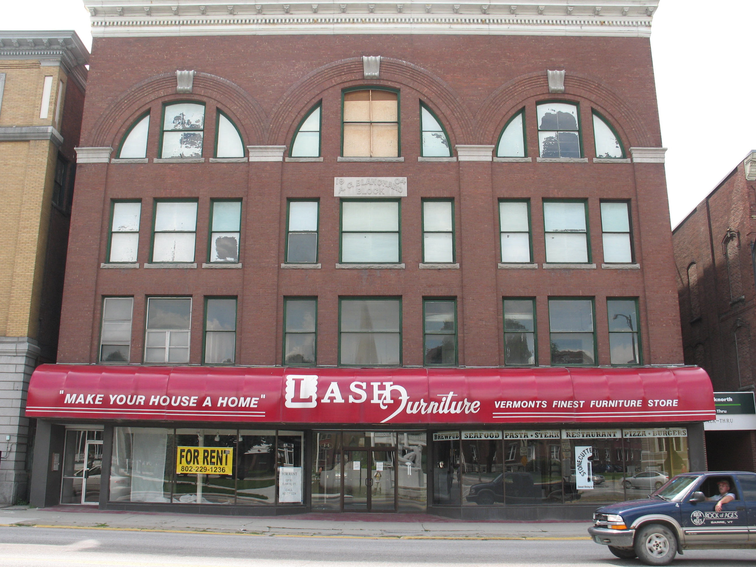 Onderdeel van het historische district in Barre, Vermont